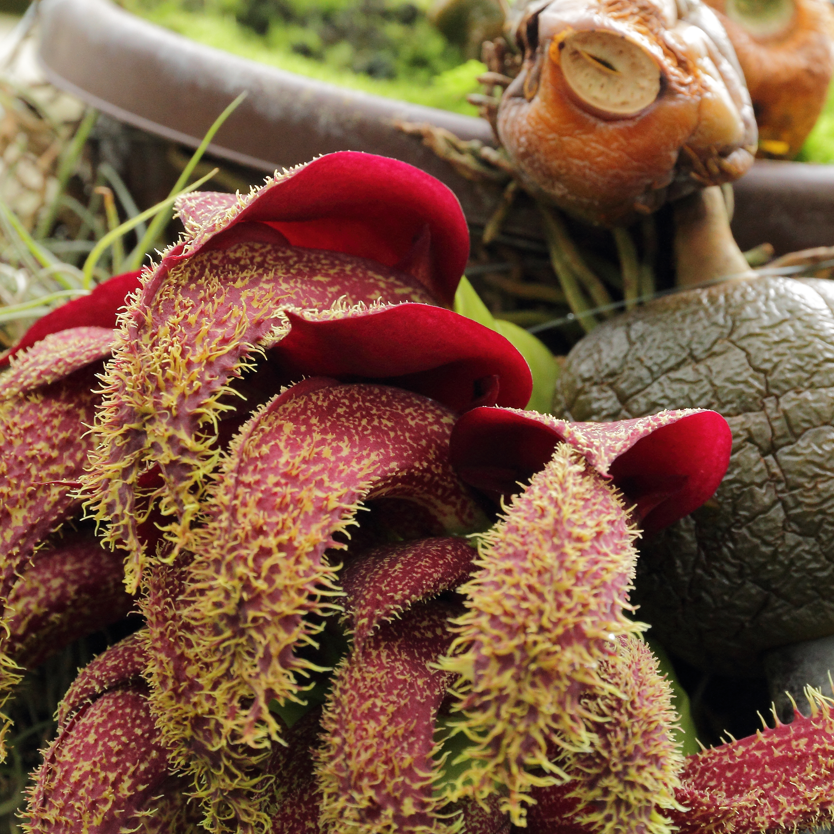 Bulbophyllum phalaenopsis i Göteborgs Botaniska Trädgård.